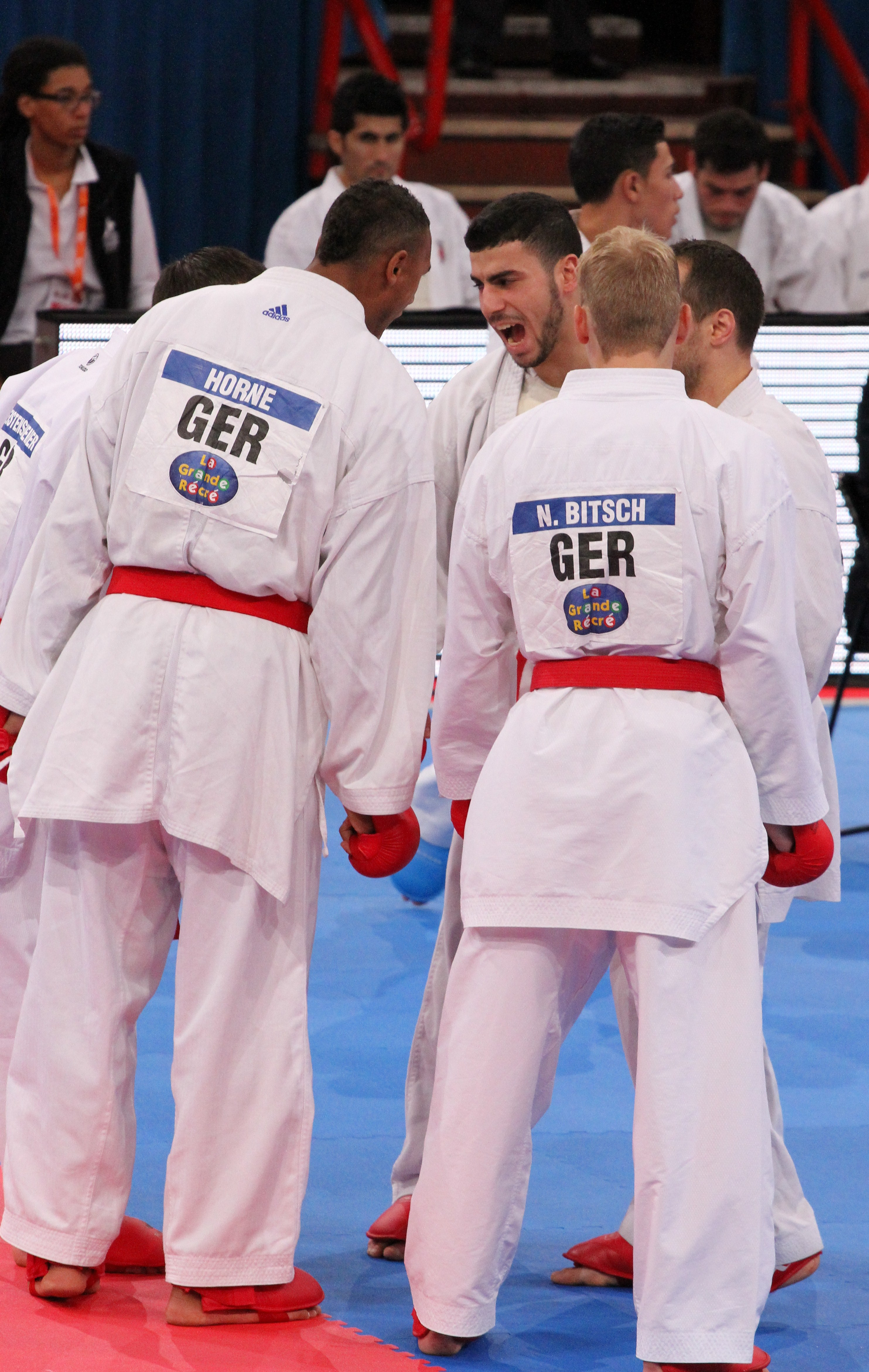 Team Germany WKF Weltmeisterschaft in Paris 2012